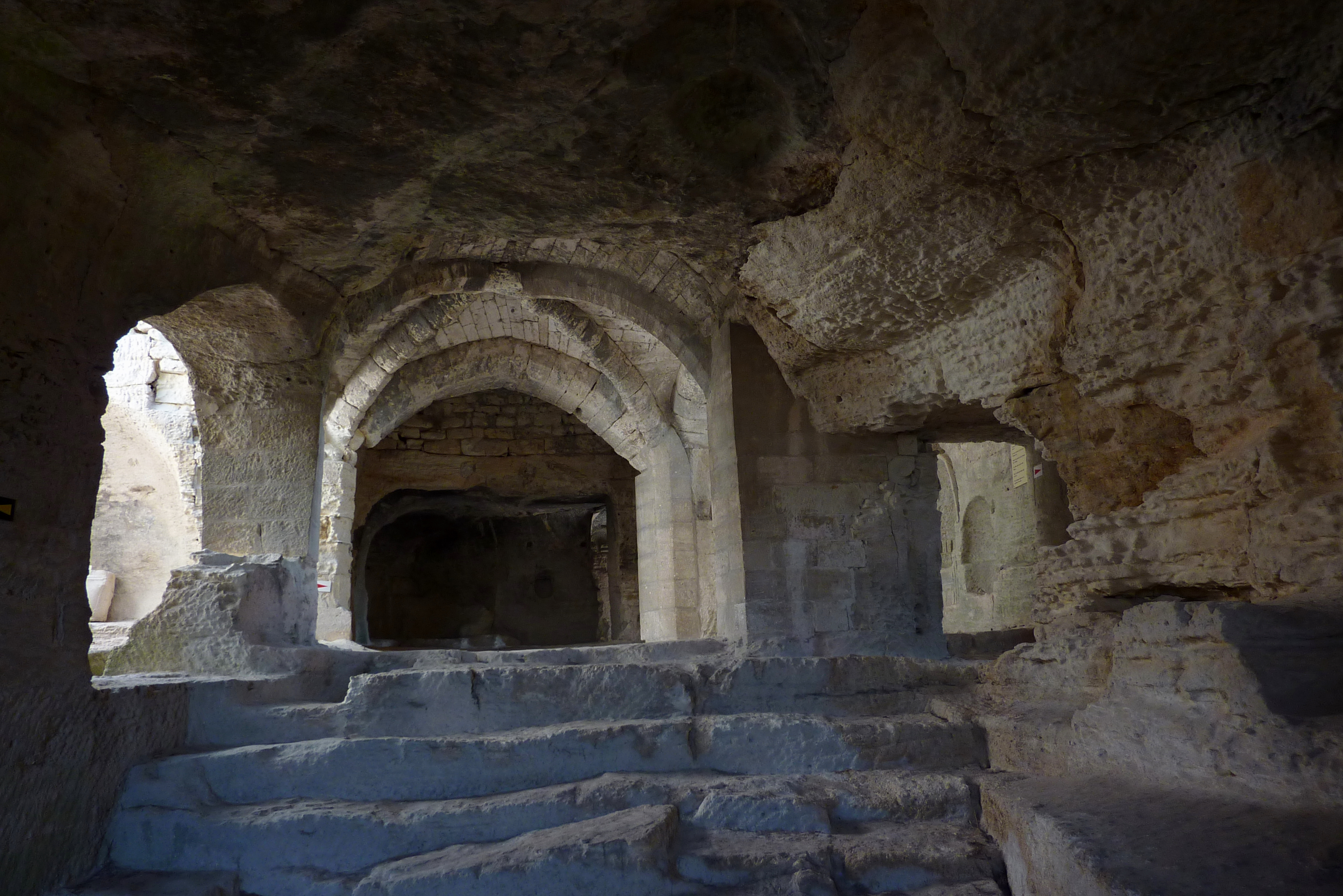 Höhlenkloster Saint-Roman bei Beaucaire, einer Gemeinde im Département Gard in der französischen Region Languedoc-Roussillon